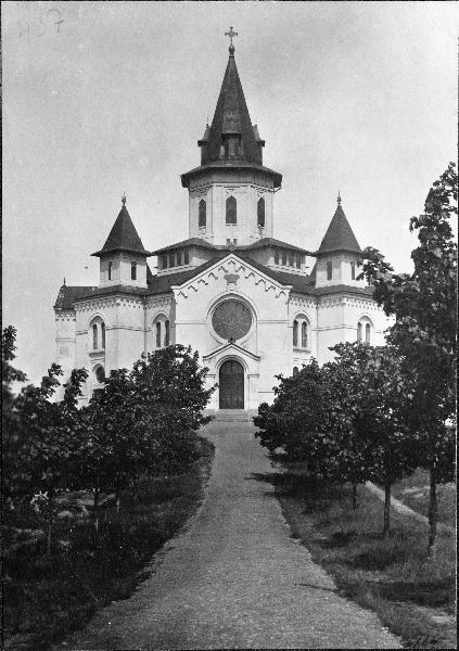 Kyrkan från söder.